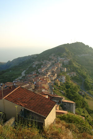 Vista del Comune di Bonifati. Foto personale. Bonifati, luglio 2006. Immagine di pubblico dominio.